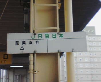 本八戸駅タブレット仮置き場